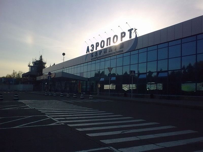 Международный аэропорт Барнаула